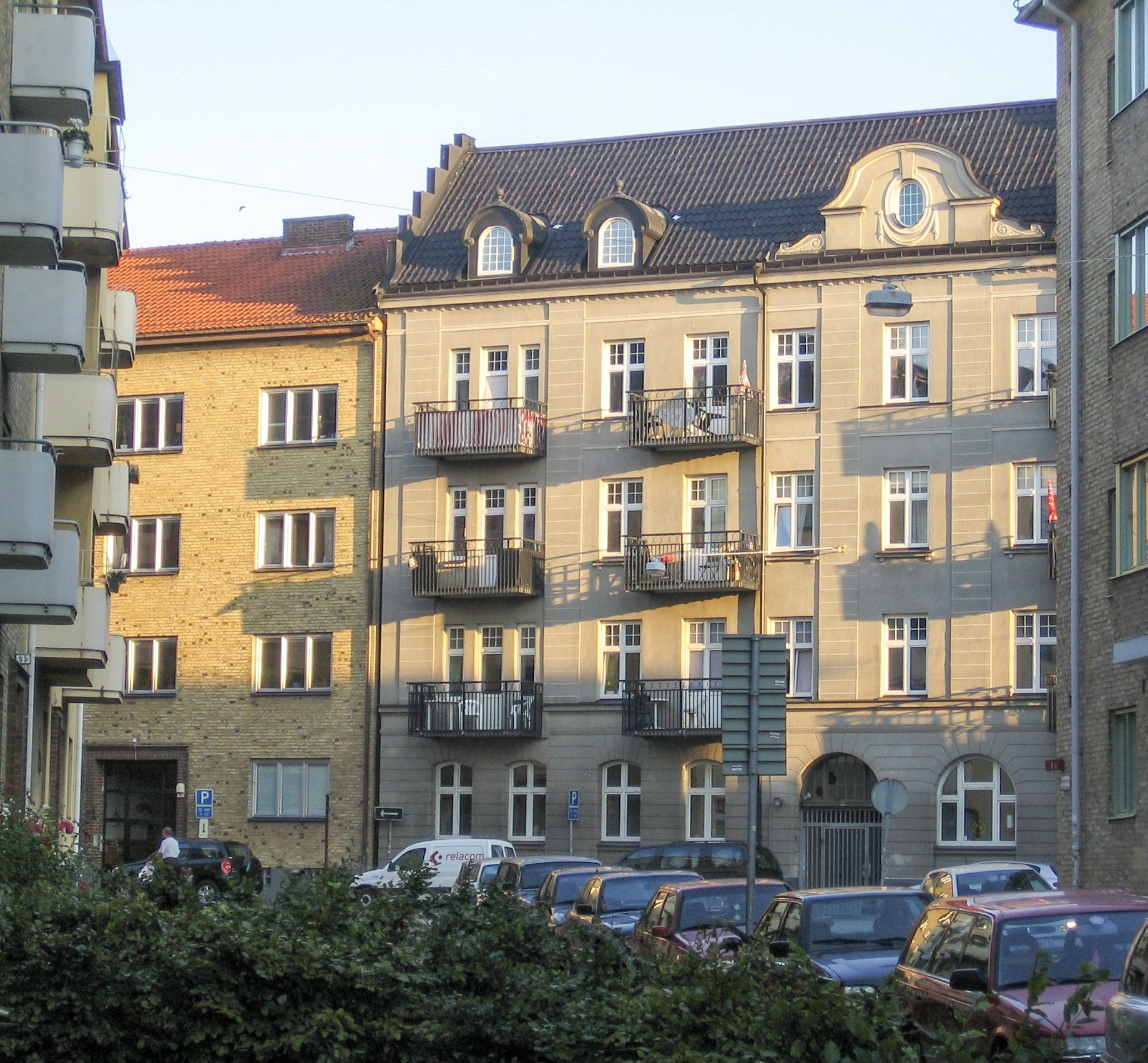 Norra Sofielund, Malmö, Sweden